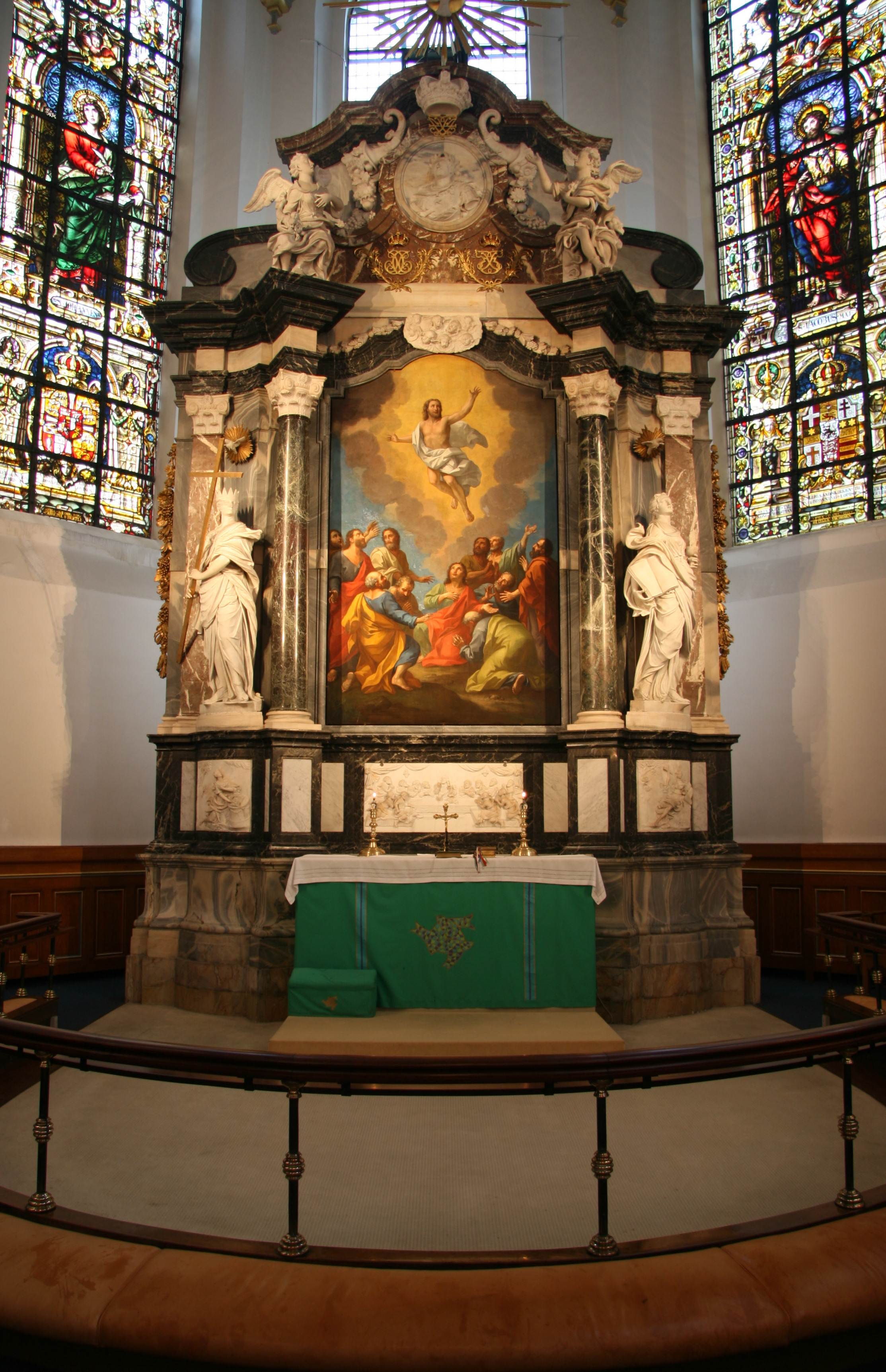 Helligåndskirken, Copenhagen, Denmark. Altarpiece